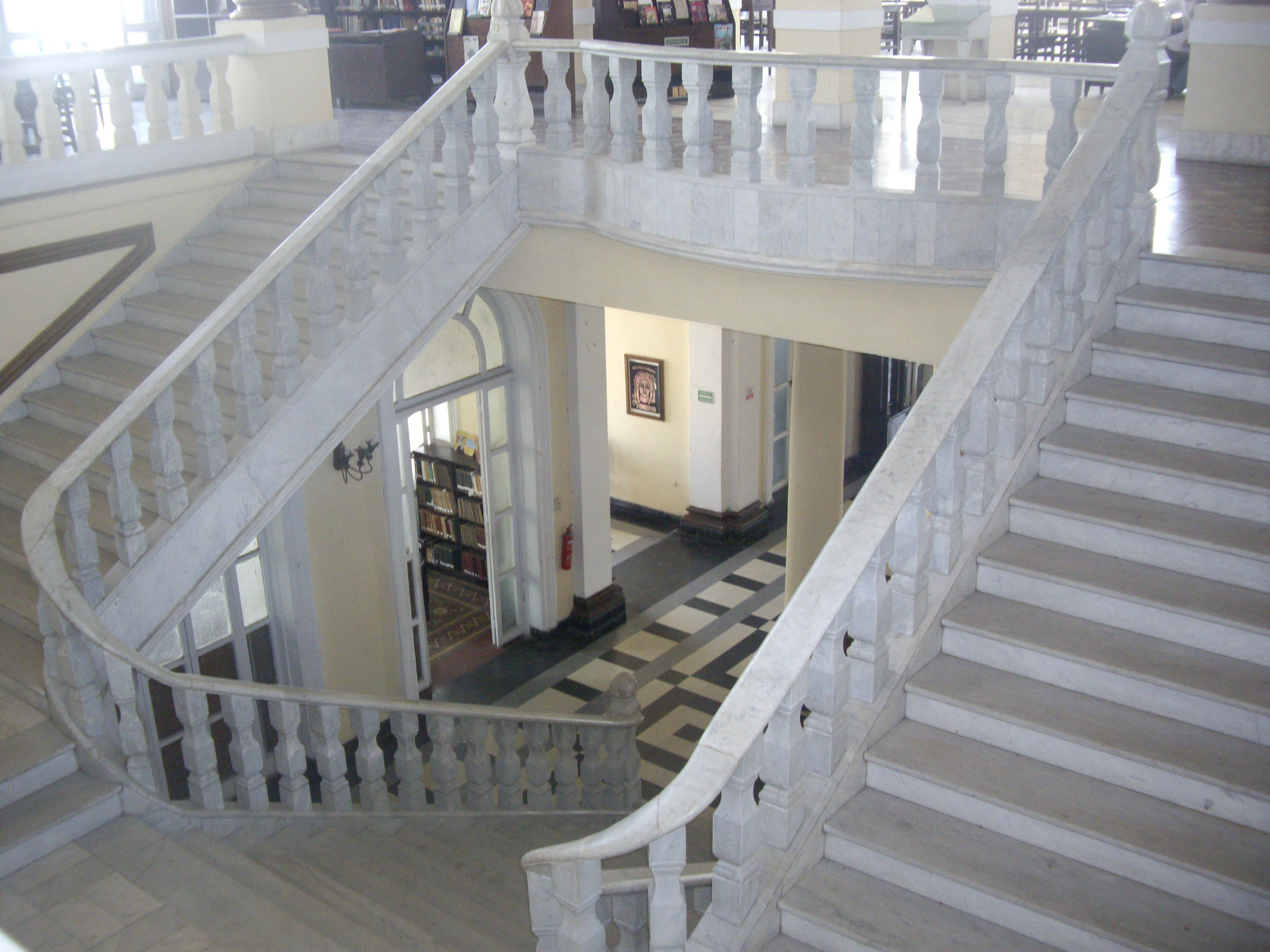 Antic Liceu i actual Biblioteca Provincial “Roberto García Valdés”. Cienfuegos, Cuba